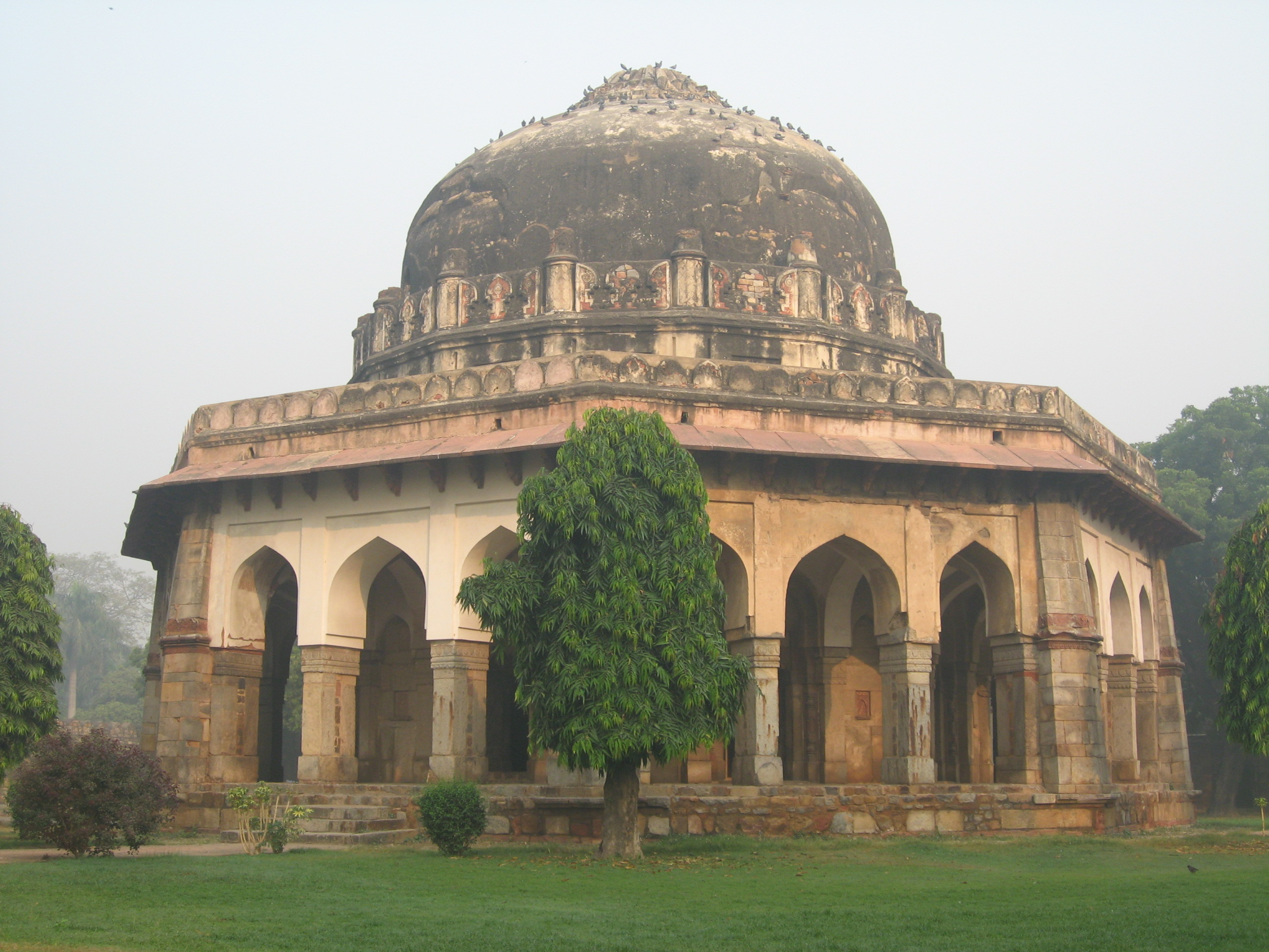 Tumb of Sikander Lodi, Lodi Garden, Delhi, India